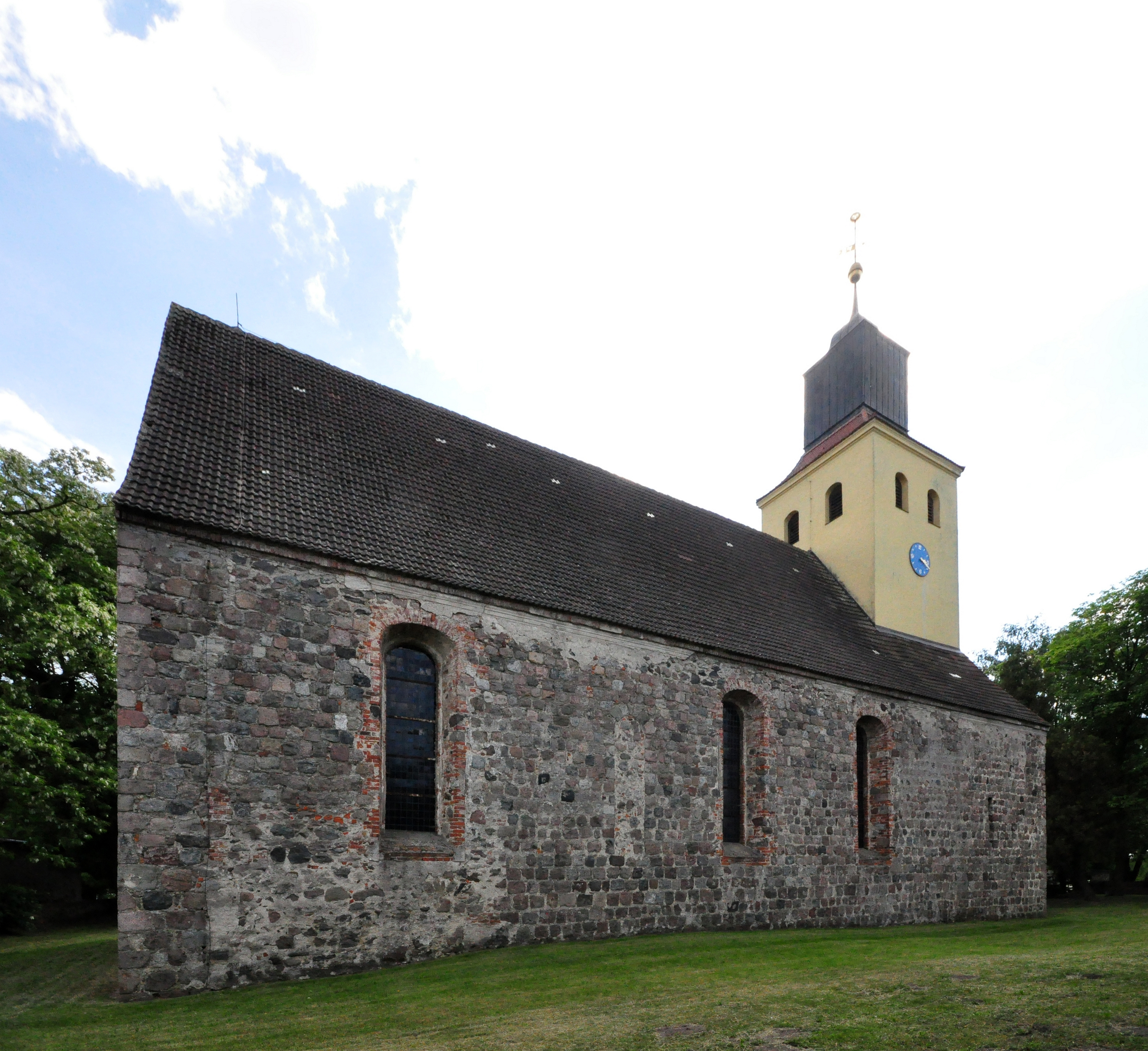 village church in Biesenbrow